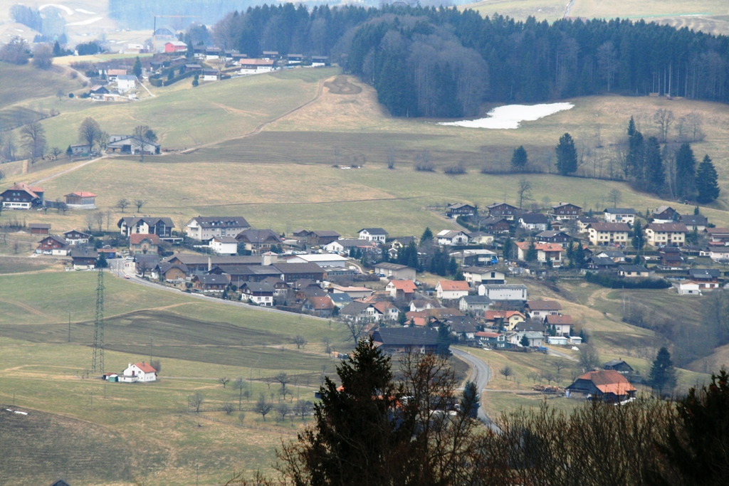 Zumholz, Kanton Freiburg, Schweiz